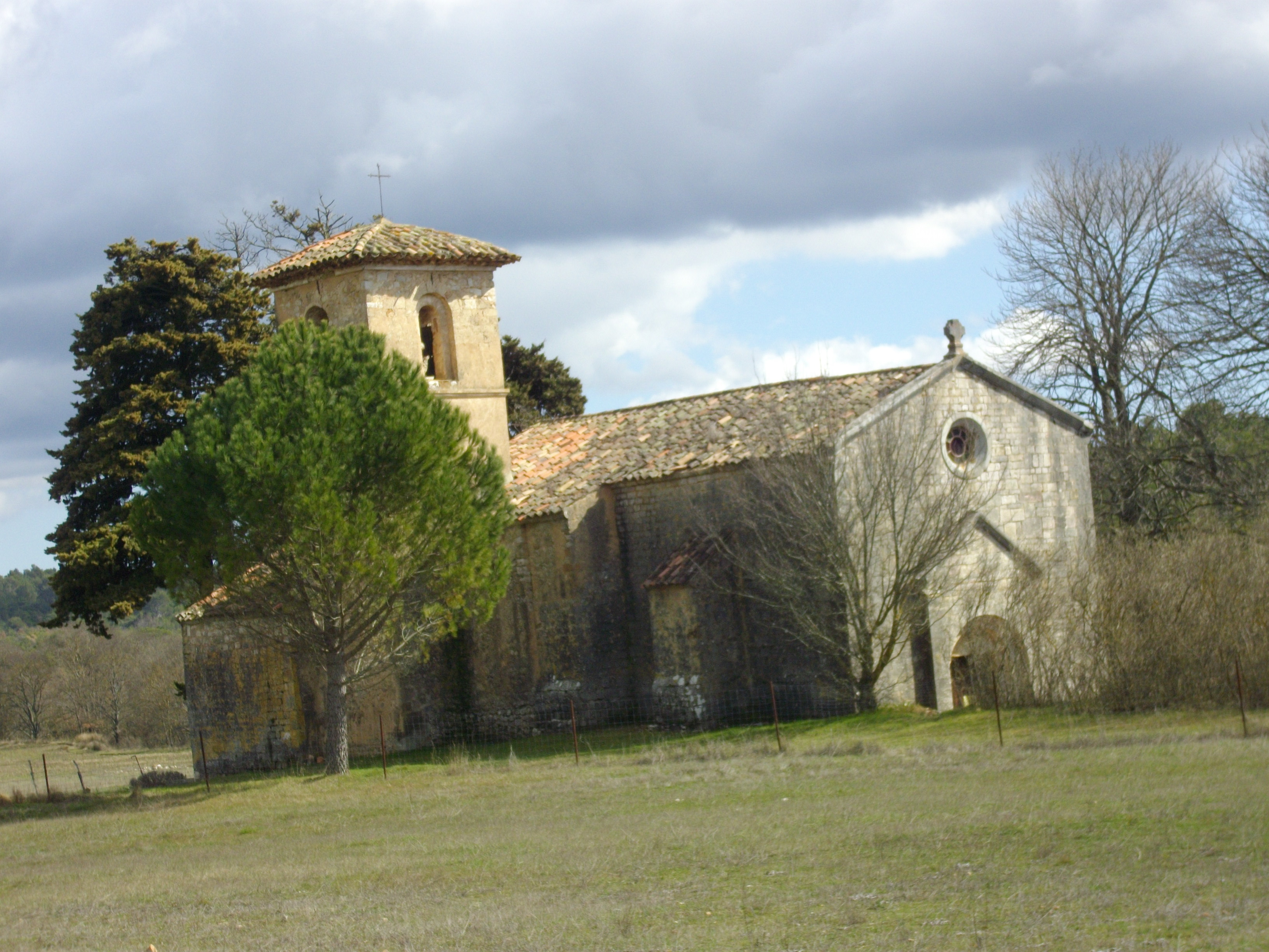 La chapelle Notre-Dame de Spéluque, Beate Marie de Speluca comme on la désignait dans les anciens textes, située dans la commune d’Ampus dans le Var (France), remonte au Xe siècle. Elle a été classées au titre de la loi du 31 décembre 1913 sur les monuments historiques, par arrêté du 26 juin 1990.